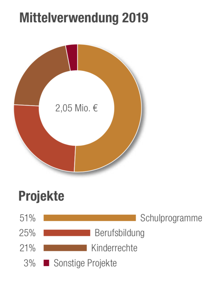 Verwendung der ideellen Einnahmen der Stiftung Childaid Network